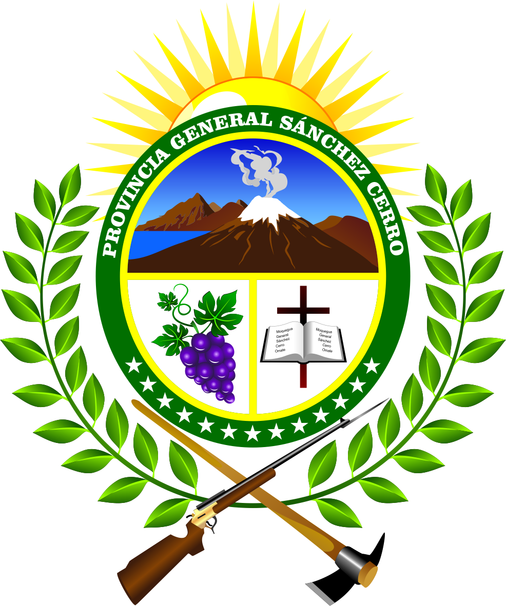 Distrito de Omate - Provincia de General Sánchez Cerro - Región Moquegua